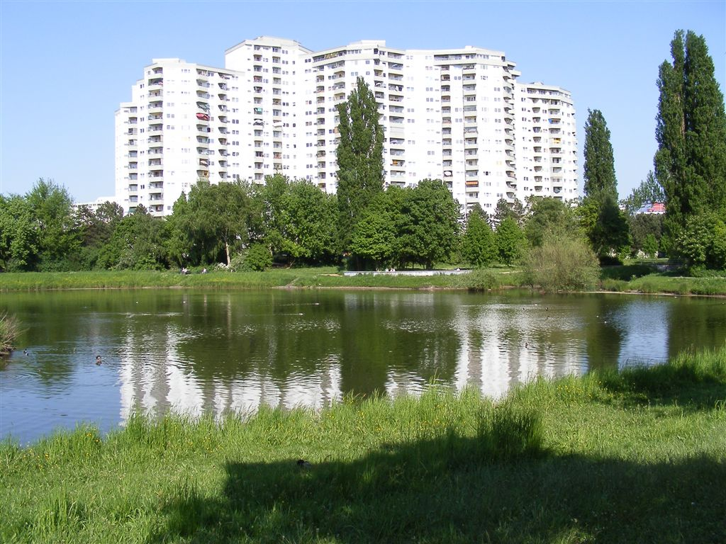 Seggeluchbecken im Märkischen Viertel - Reinickendorf - Berlin